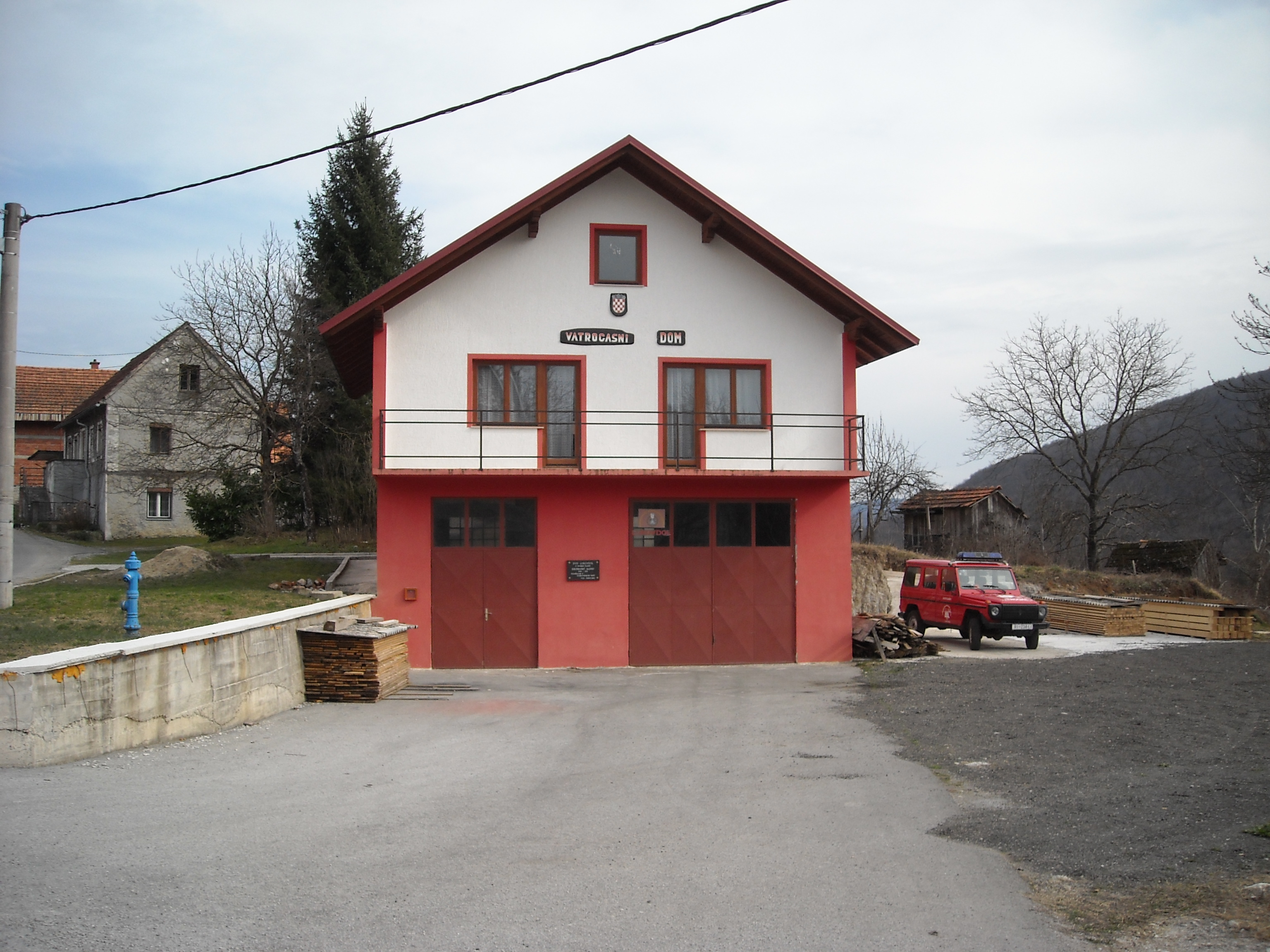 Na slici je vatrogasni dom Lukovdol